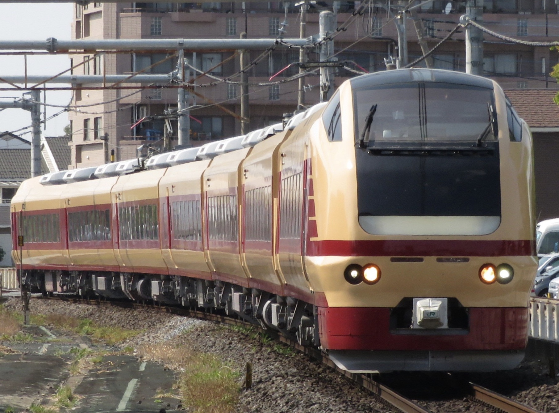 臨時列車を中心に運転するE653系1000番台水カツK70